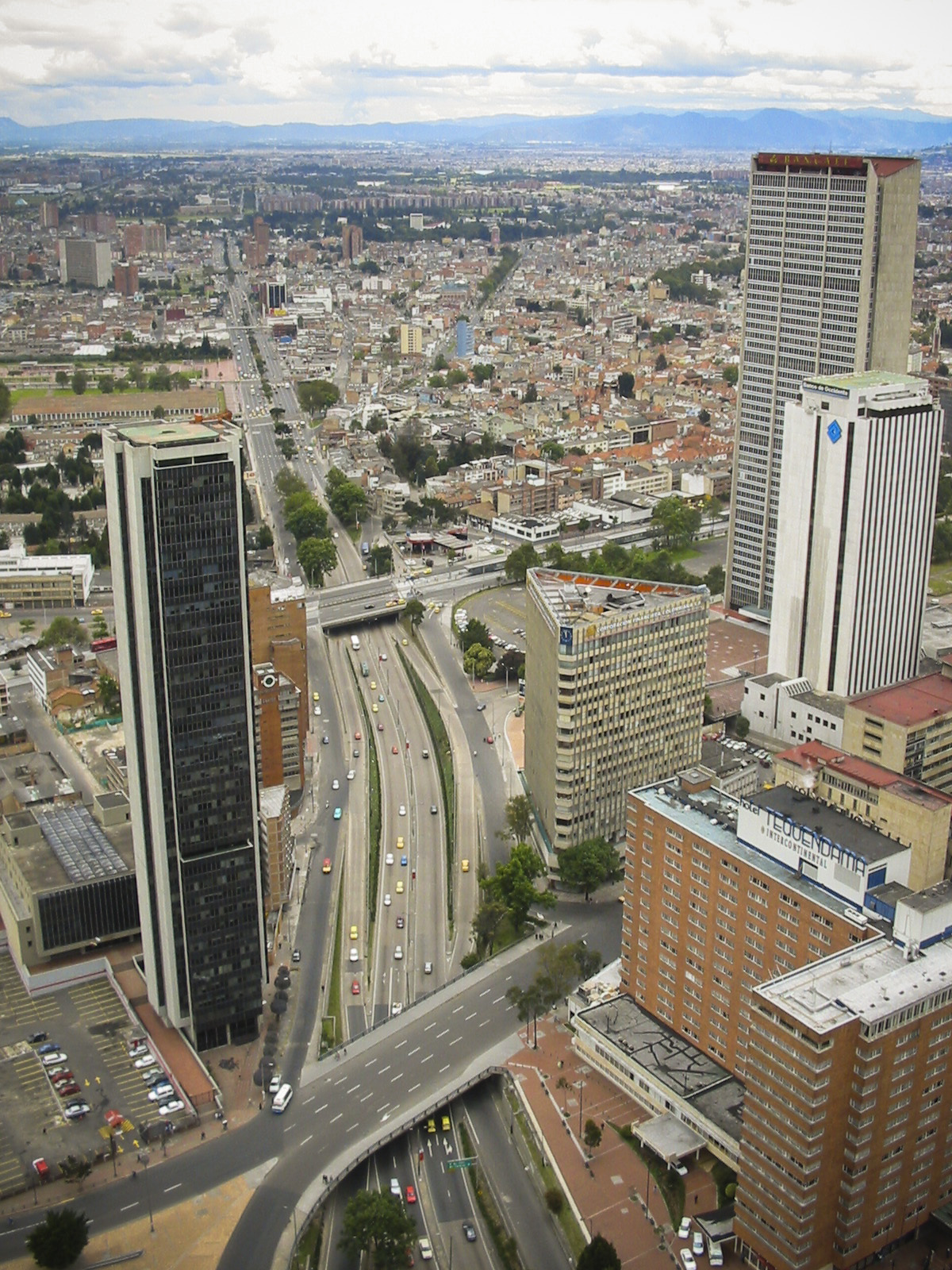 Av El Dorado / Calle 26 - Bogotá Cund, Colombia